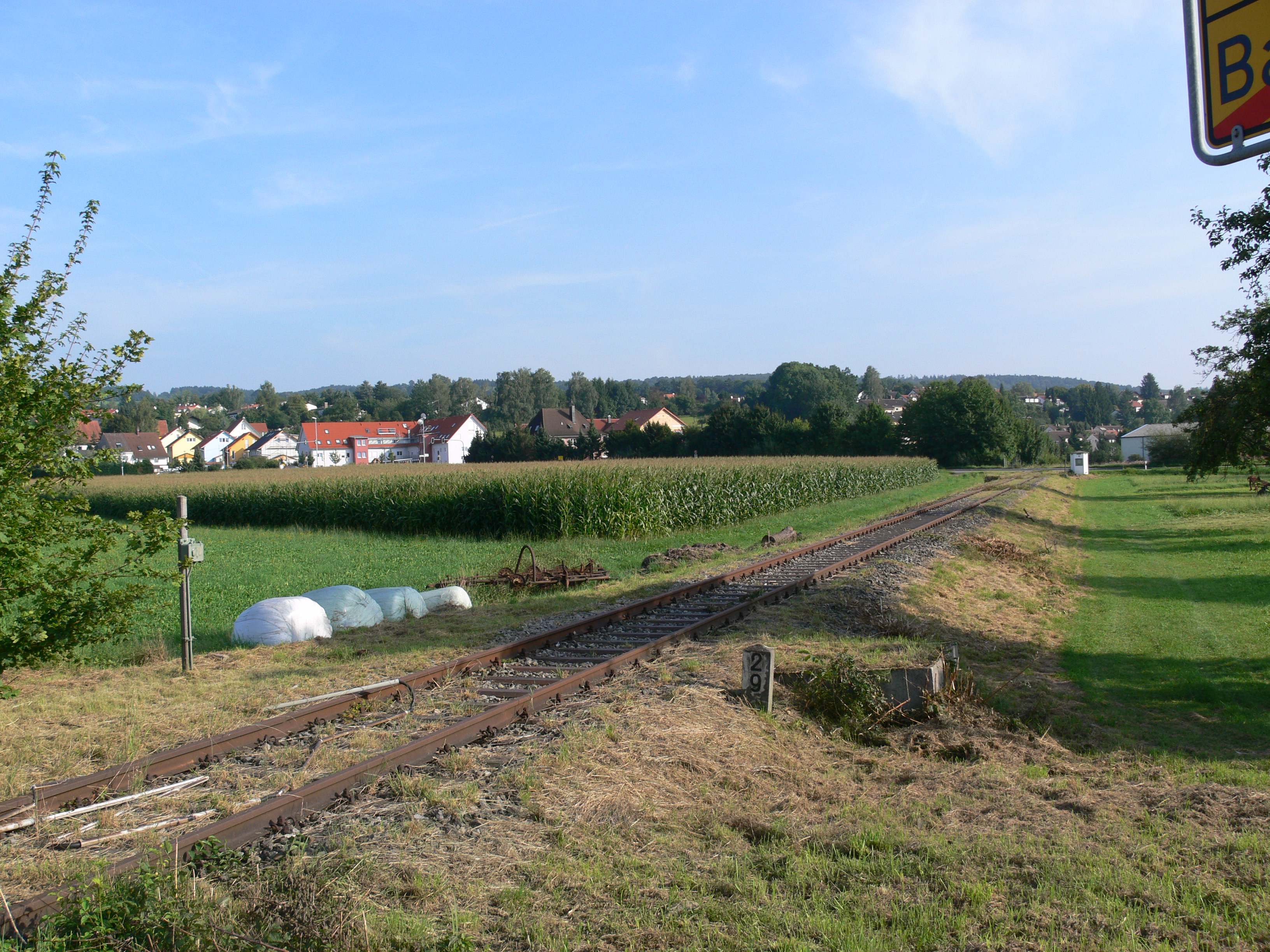 Gleise der ehemaligen Nebenbahn Niederbiegen–Weingarten Baienfurt, östlich der früheren Bundesstraße, Blick in Fahrtrichtung Weingarten (Km 2,9 der Nebenbahn Niederbiegen-Baienfurt, am Beginn des Dreischienengleises)